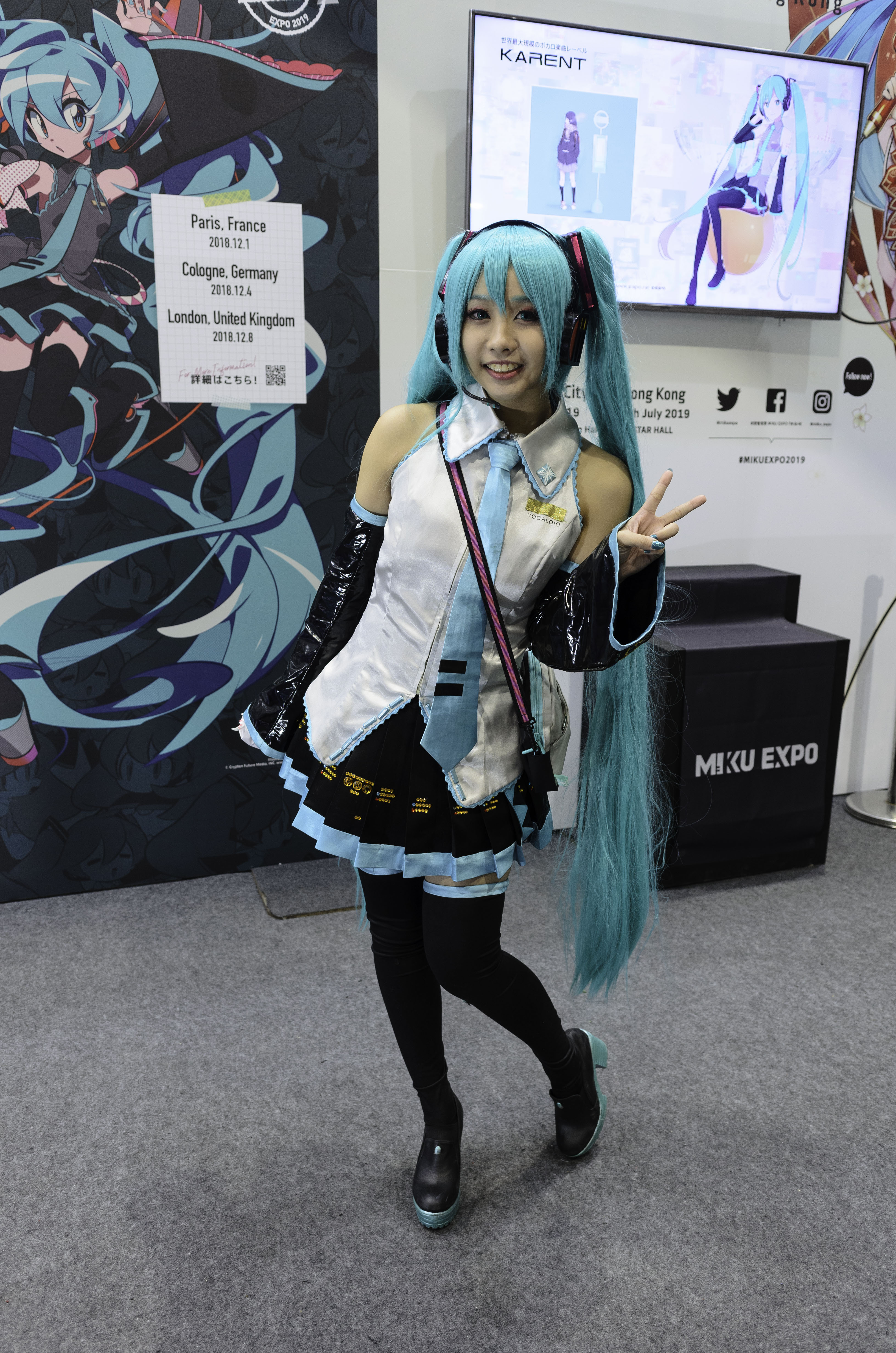 2019年台北國際動漫節，「HATSUNE MIKU EXPO 2019 Taiwan & Hong Kong」攤位，初音未來cosplayer。